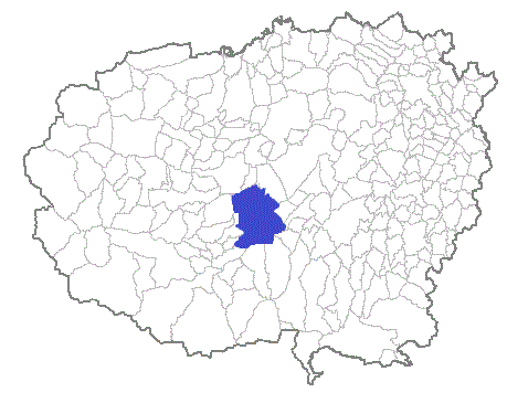 Posizione del comune nella provincia di Cuneo